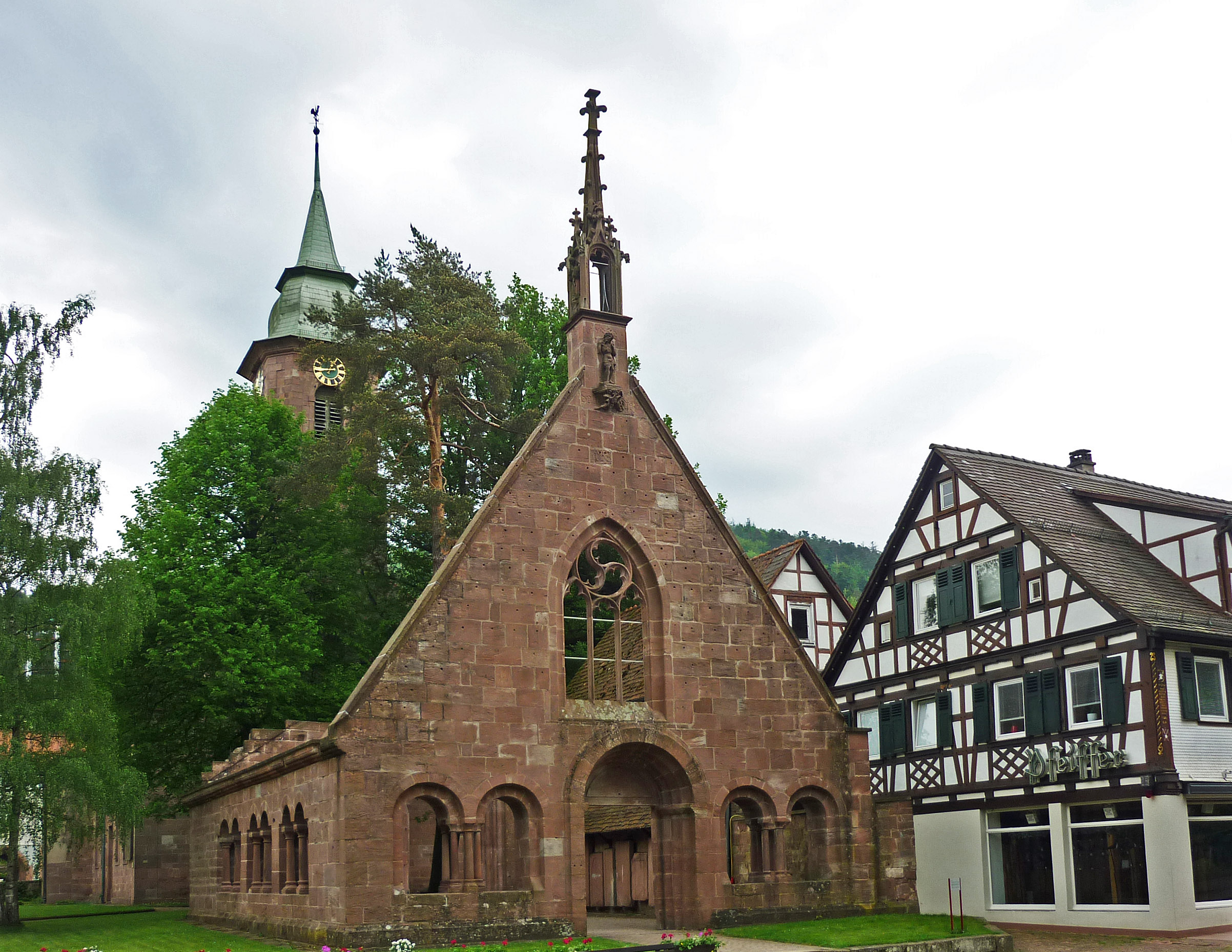 Klosterkirche in Herrenalb, Lkr. Calw (Württemberg)